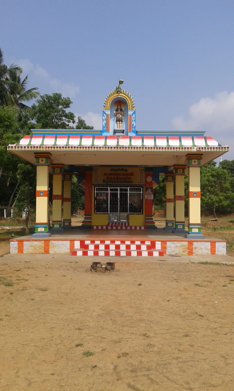 Sudalai